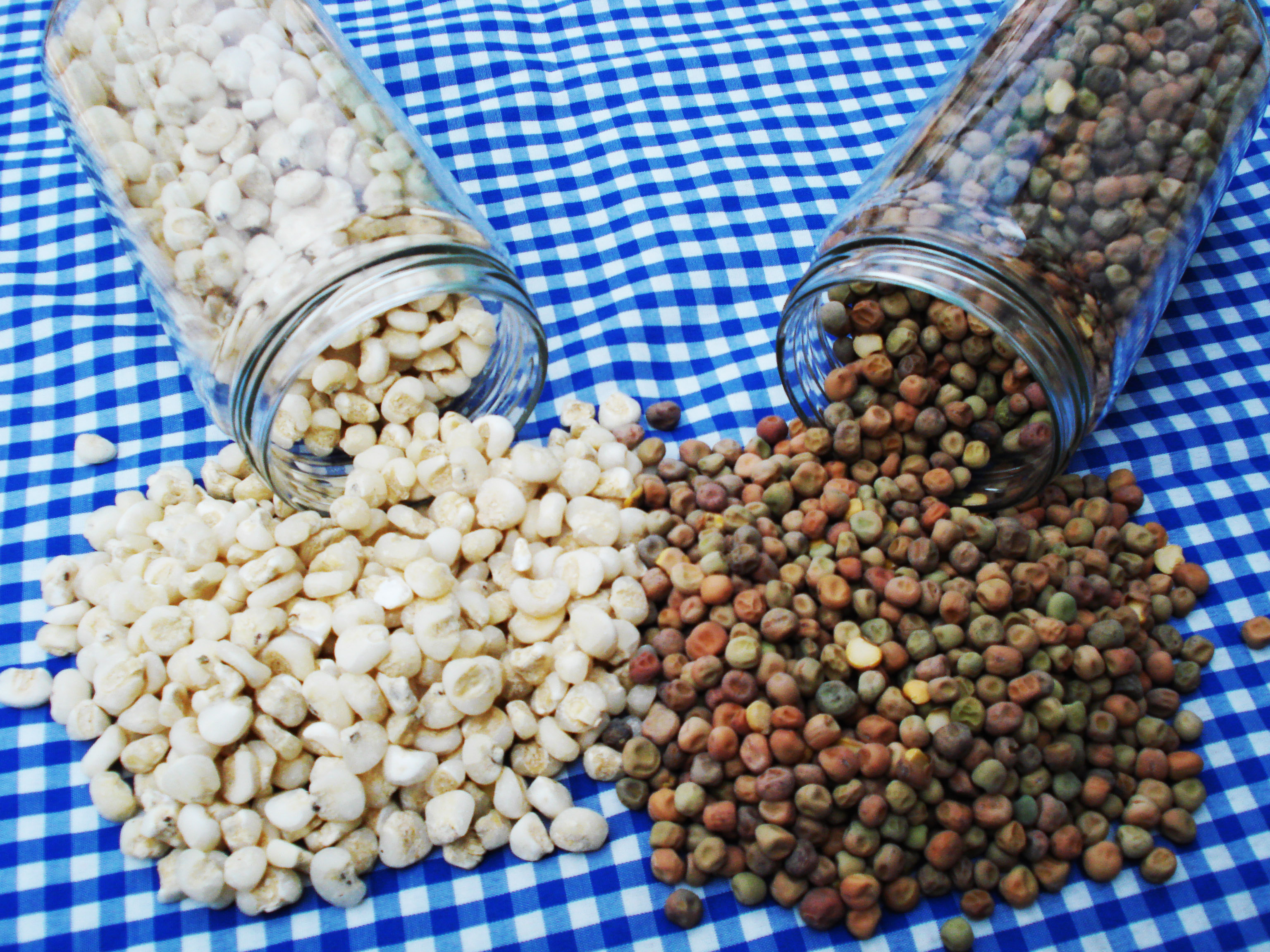 Grans de blat de moro escairat en sec i pèsols negres en sec.